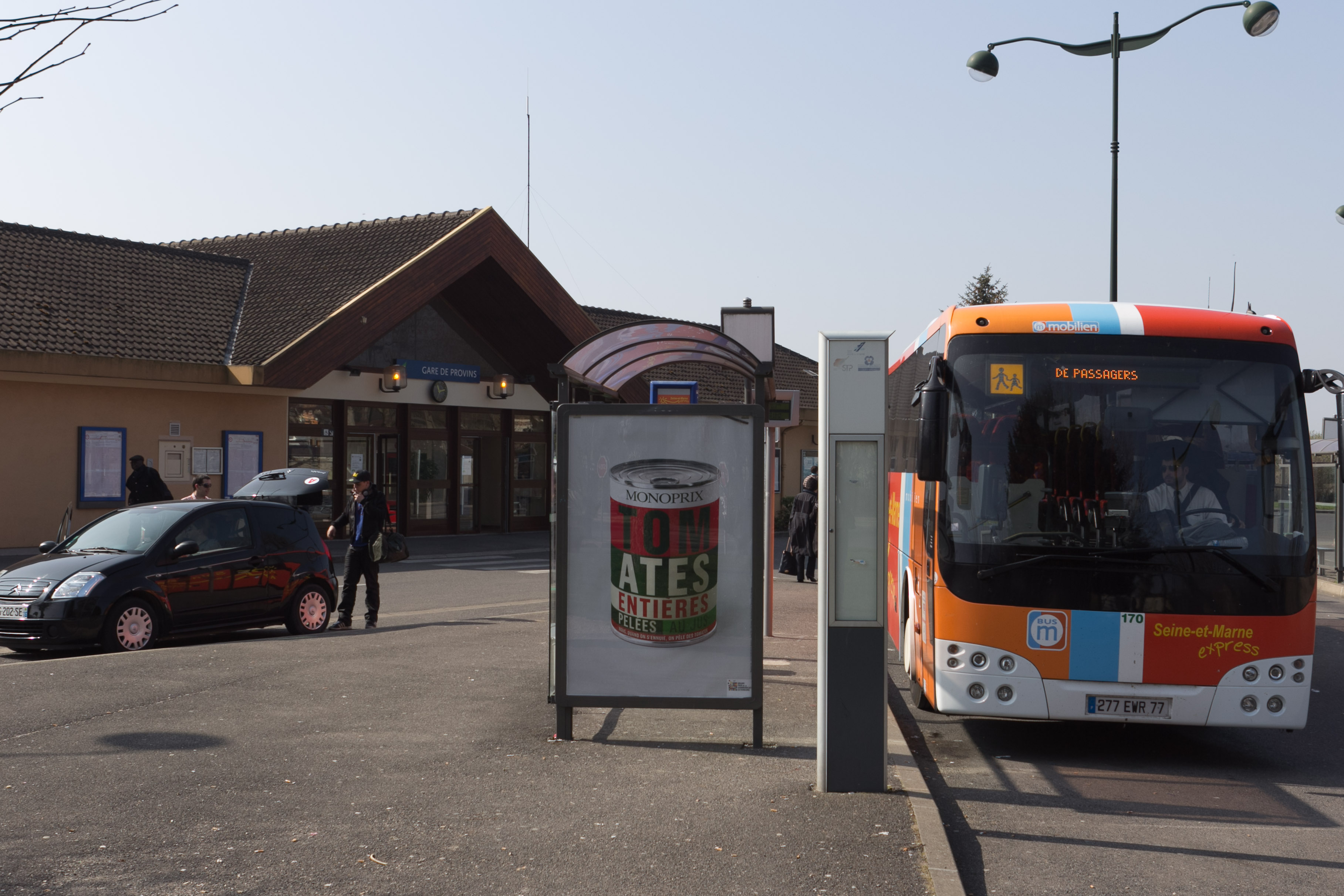 Gare routière de Provins, Provins, département de Seine-et-Marne, France